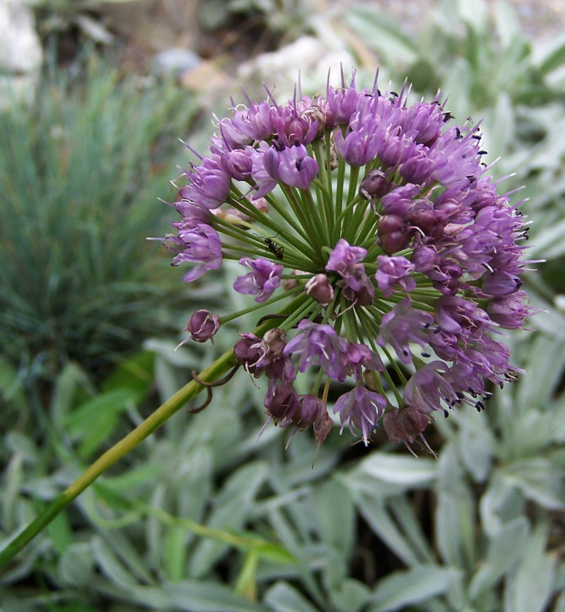 Allium montanum (pl. czosnek skalny)